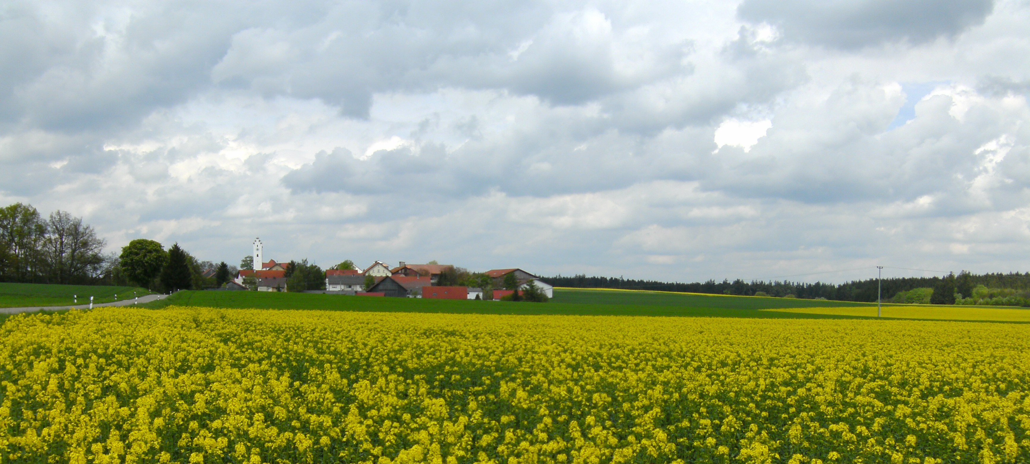 Kirchbuch, Gemeindeteil der Stadt Beilngries im Landkreis Eichstätt, Bayern